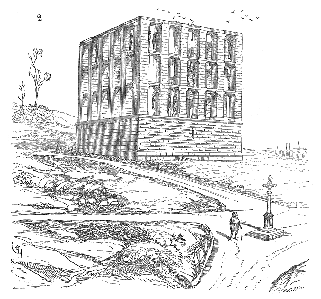 ...Nous donnons (2) une vue de cet édifice du côté de l'arrivée faisant face au sud-ouest. Le degré étant placé, bien entendu, par derrière, les condamnés étaient amenés sur la plate-forme après avoir fait le tour du massif de maçonnerie. En bas de notre figure est placée la croix de Guiliaume de Tigouville, indiquée d'ailleurs dans la tapisserie de l'Hôtel de ville....